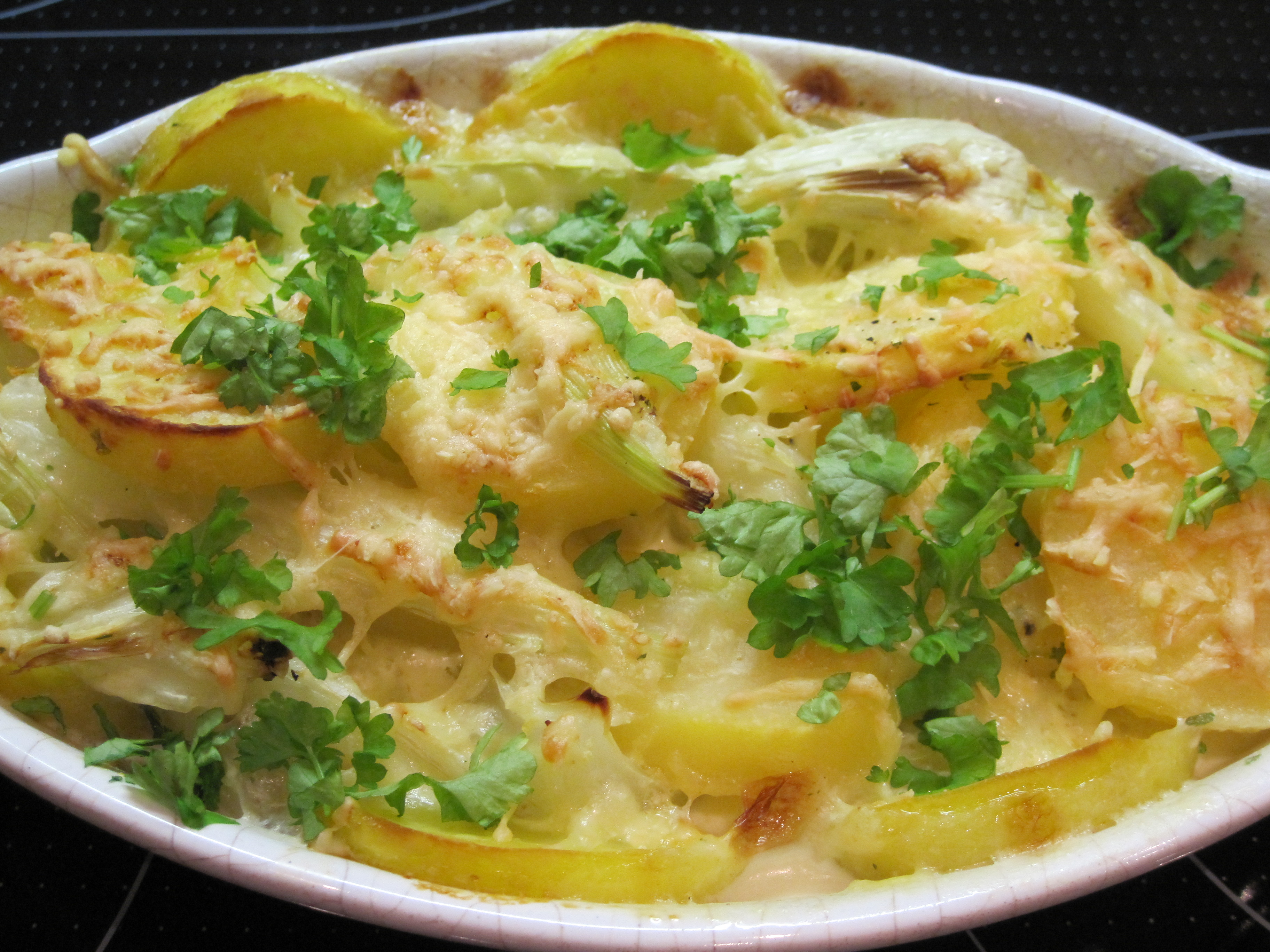 Auflauf mit Kartoffeln und Kohlrabi